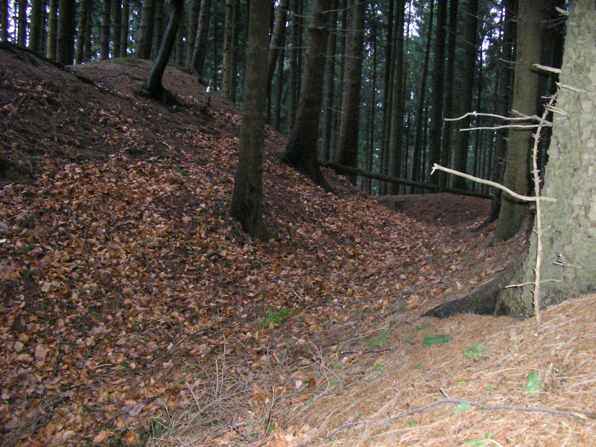 Falk Oberdorf Burggraben auf dem Meesekopf